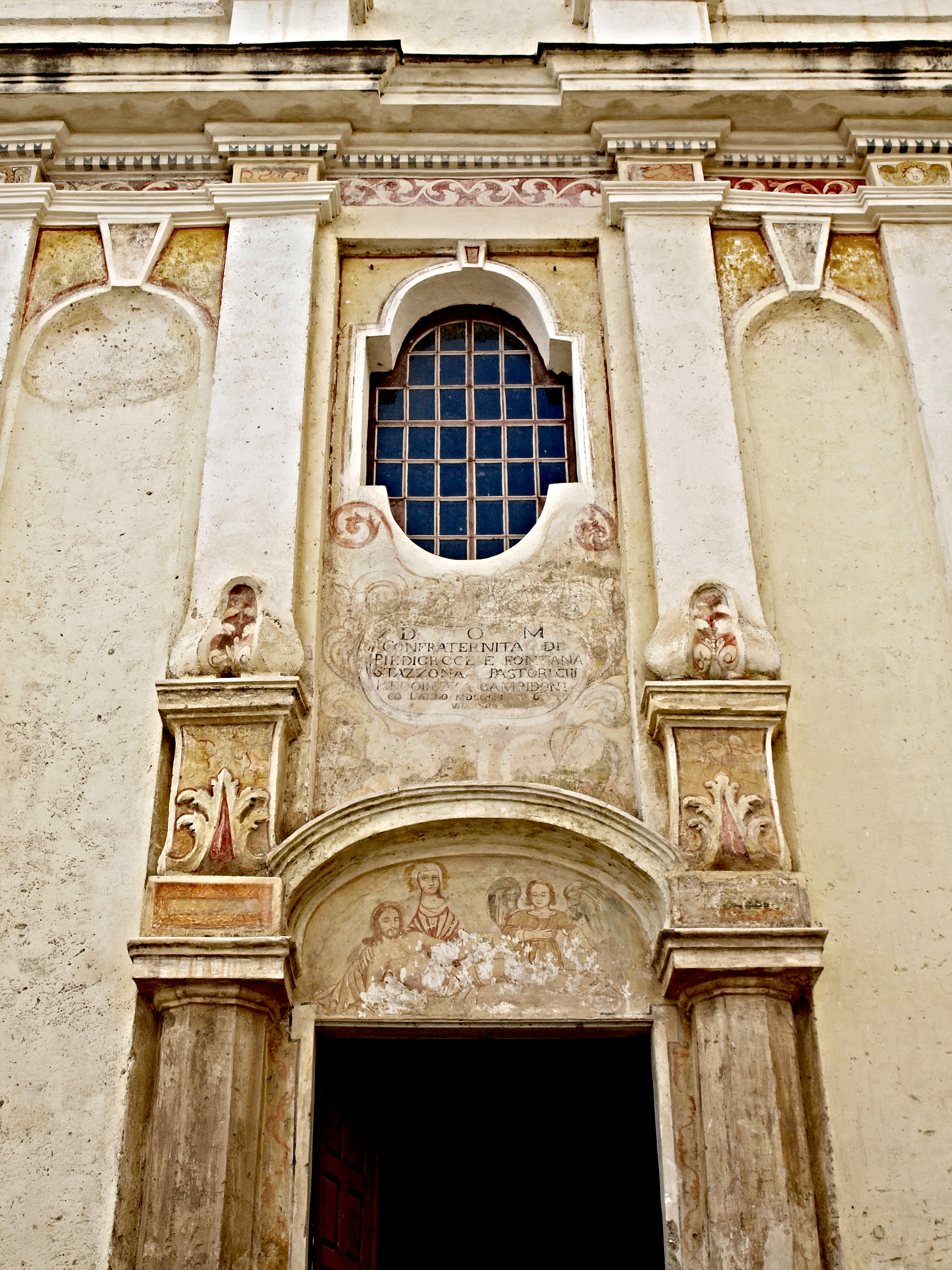 Piedicroce, Castagniccia (Corse) - Entrée de l'église (portail, fenêtre, corniche, pilastres, chapiteaux) Saint-Pierre et Saint-Paul (MH)